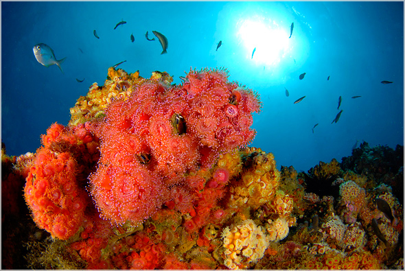 foto del arrecife de juan Fernandez en el archipiélago homónimo